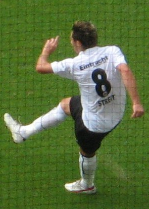 Albert Streit im Bundesliga-Spiel gegen Hertha BSC.